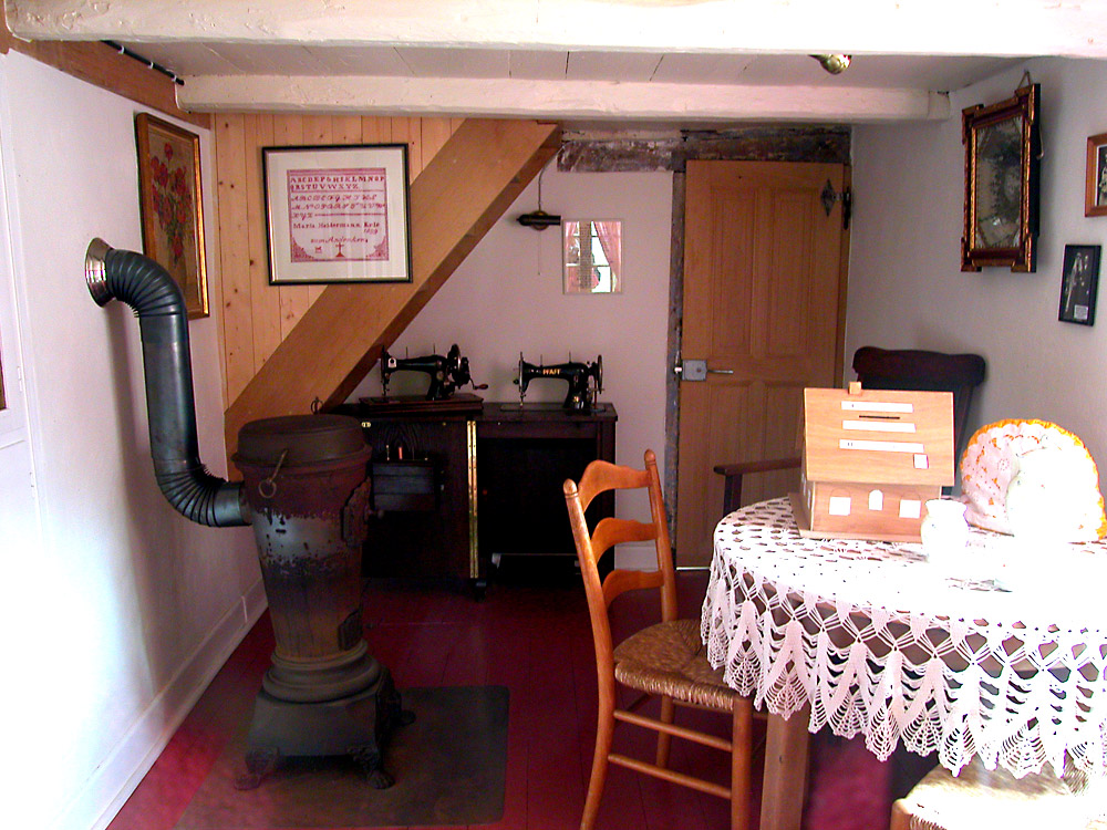 Museum in Dorsten-Rhade